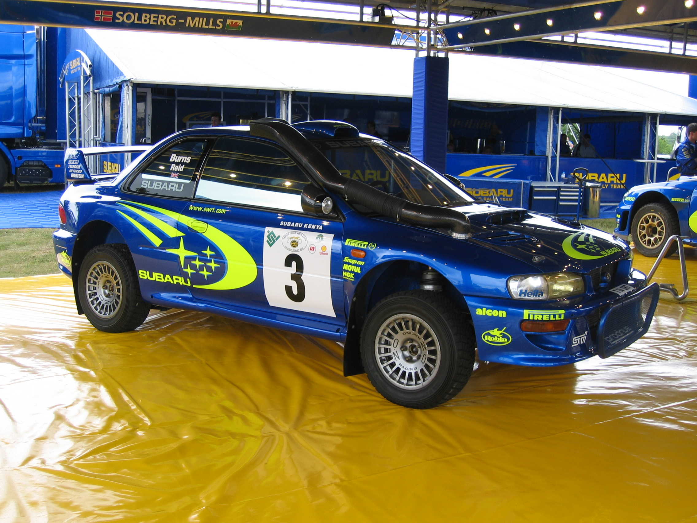 Richard Burns' Subaru Impreza WRC at 2006 GFoS.